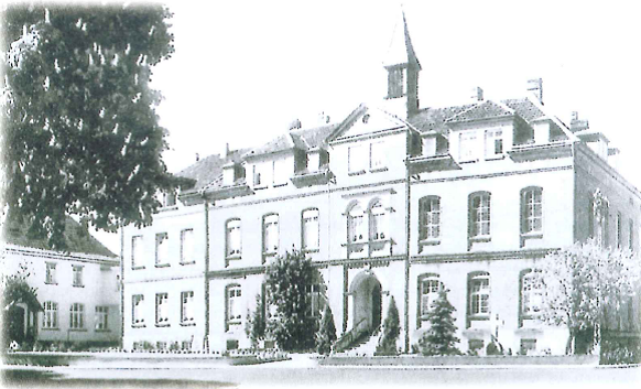 St. Rochus in der Hospitalstraße ab 1892